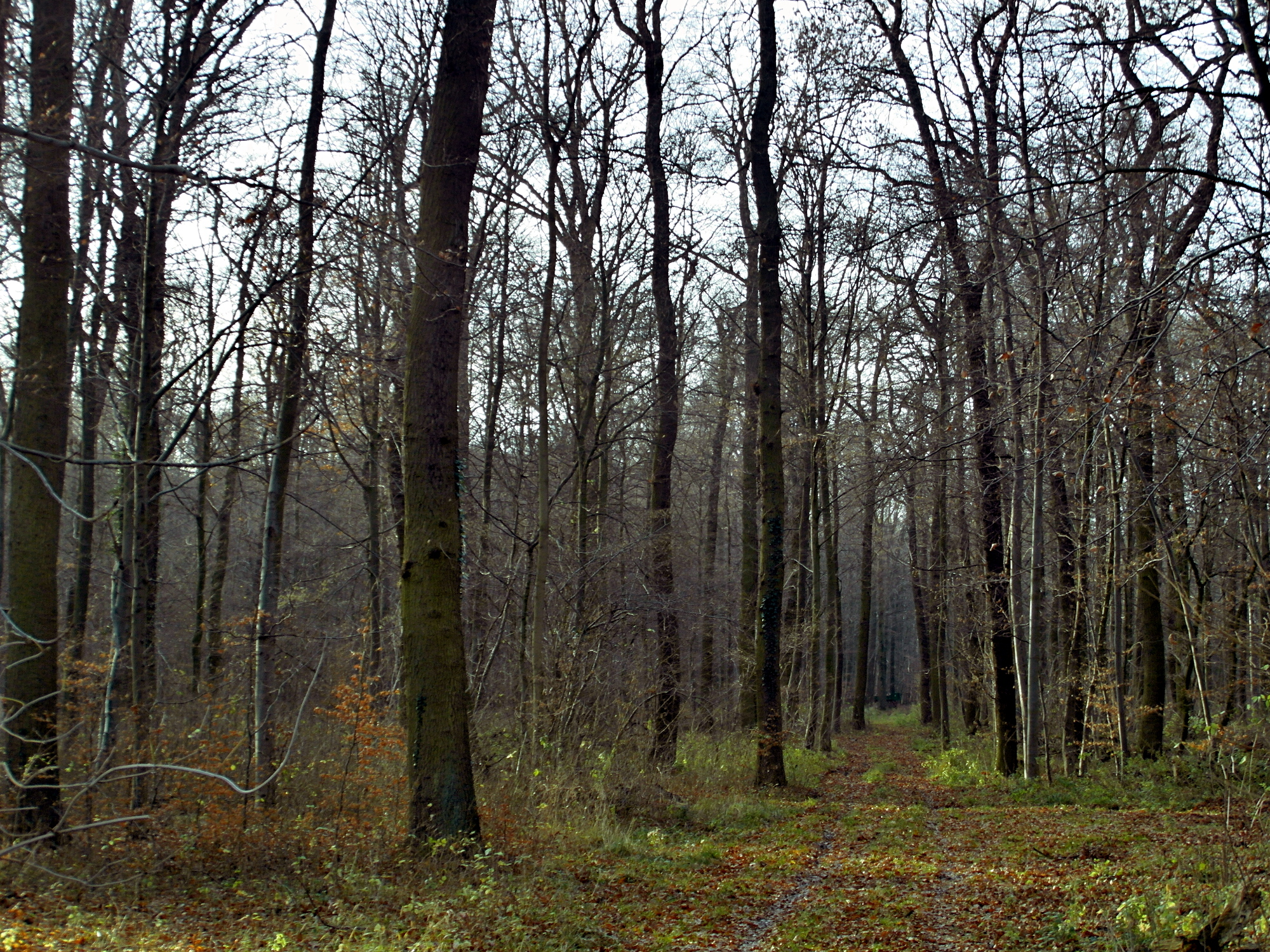 Weg im Nordosten des Linderter und Stamstorfer Holz, einem FFH-Gebiet in der Region Hannover in Niedersachsen